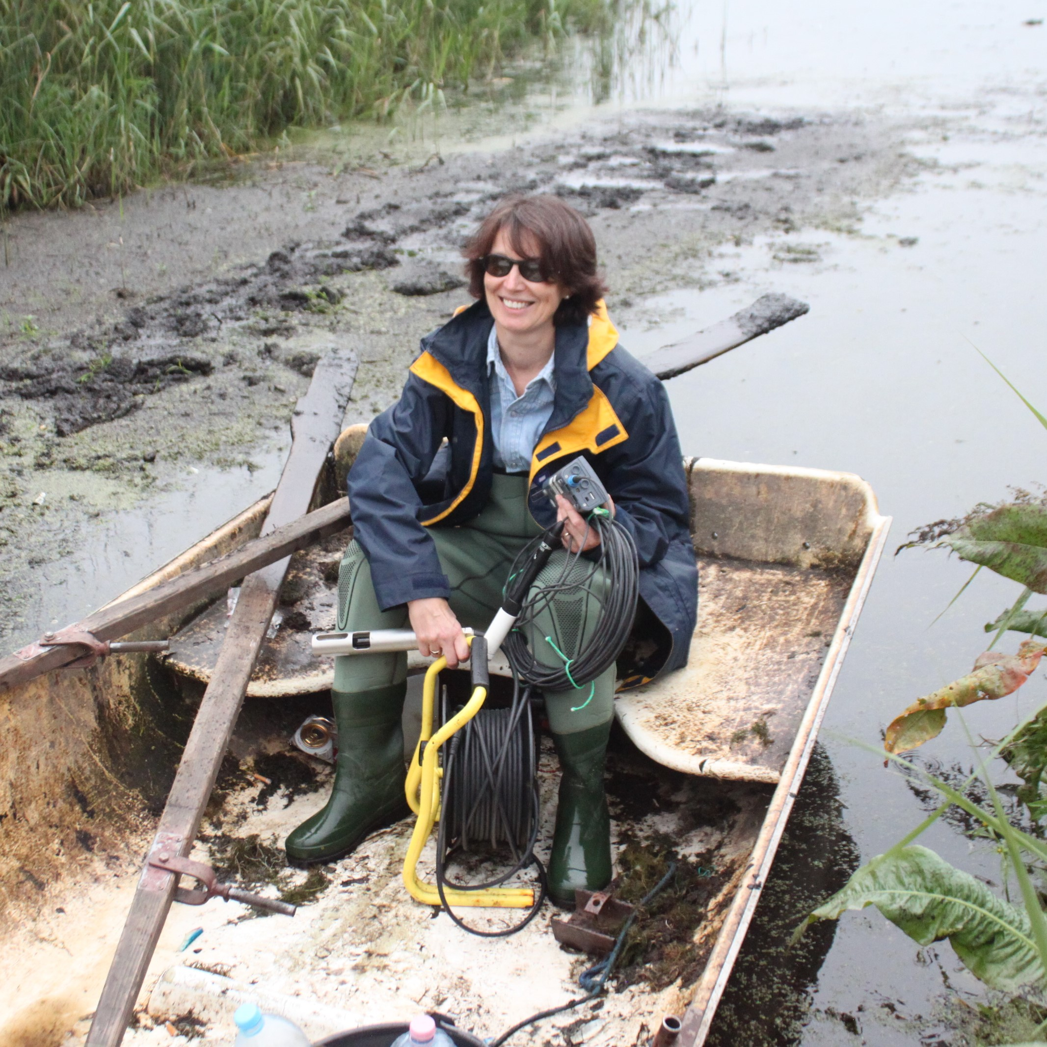 Iwona Jasser preparing to take measurements of water samples in Masurian Lakeland